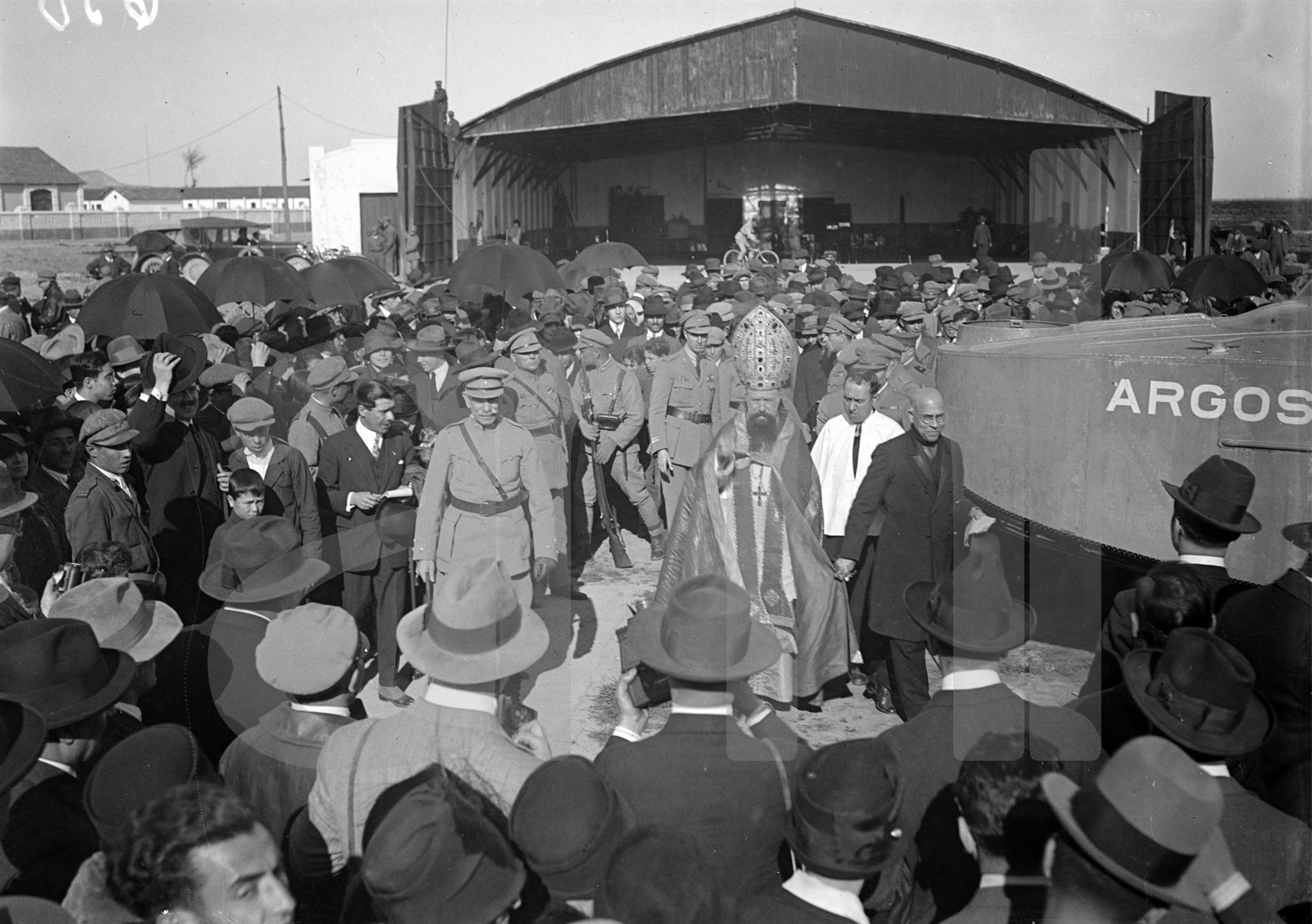 Baptismo do hidroavião Argos, pelo bispo de Trajanopolis. Atrás do prelado o aviador Sarmento de Beires. Em Alverca, Vila Franca de Xira - Semelhante à imagem publicada no jornal O Século, de 21 de Fevereiro de 1927